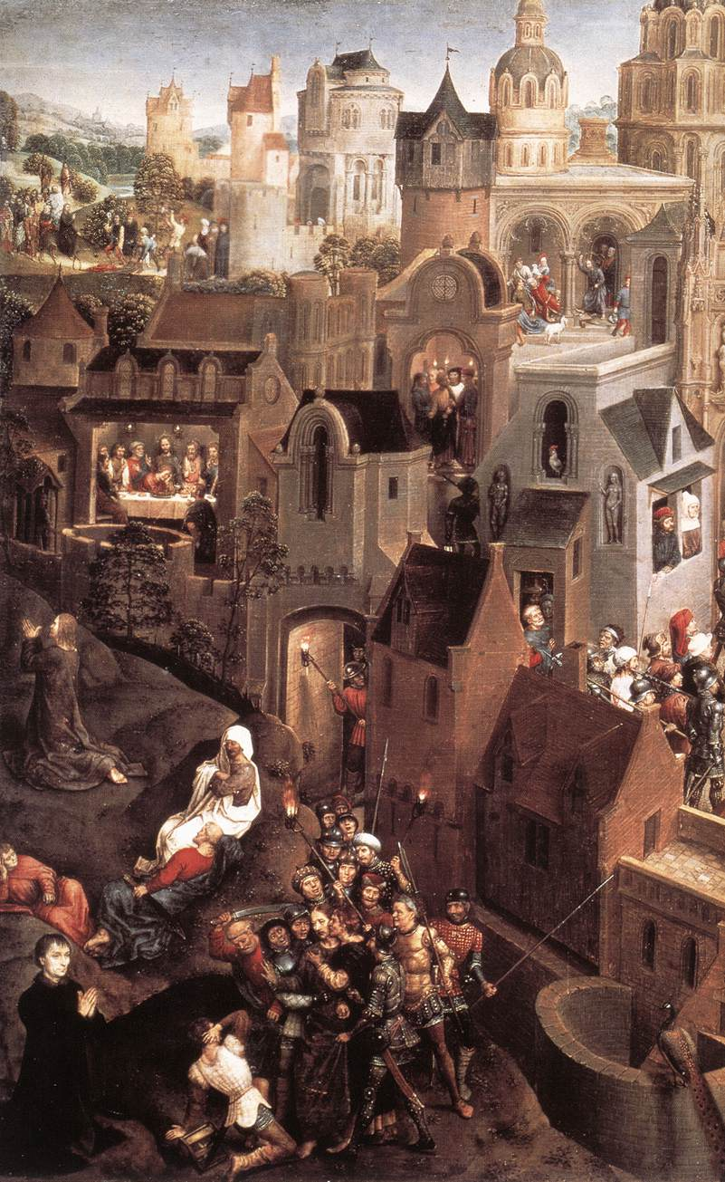 (left side)